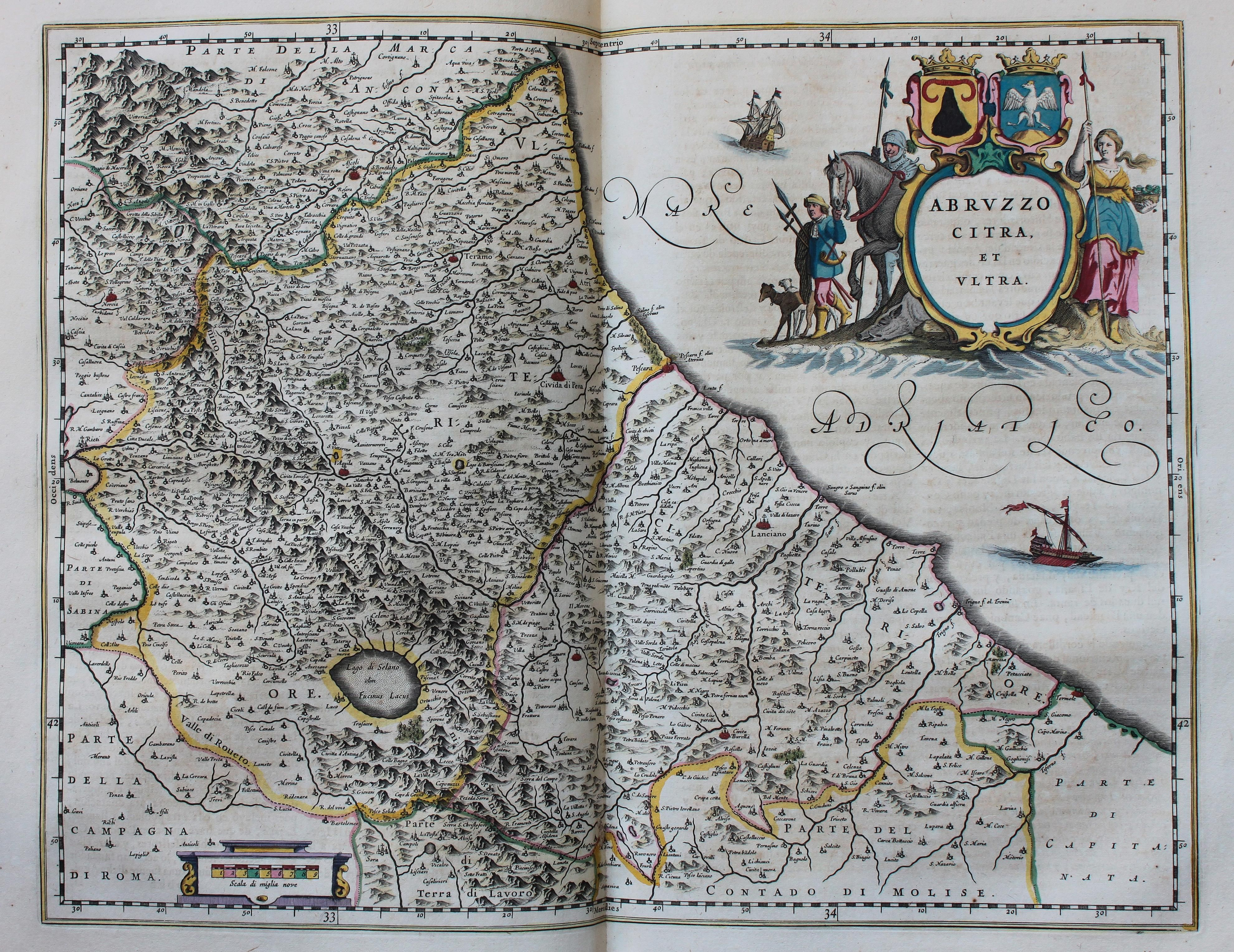 Descripción bibliográfica: Geographia Blaviana. - [Amsterdam : Juan Blaeu, 1659] . - [32], VI, 96 p., 34 f., h. 35a, 35b, 35c, 35d, 36-44 f., 34, [2], 36-40, [2], 43-70 [i. e. 75], [1] f., [20] p. de map., [9] f. de map., [4] f. pleg. de map., [2] f. de plan., [2] f. ge grab. : |bil. ; |cFol. marca major (57 cm.) . - En la dedicatoria a Felipe IV: "Presenta ... El Atlas Universal y Cosmographico de los orbes y terrestre ... Juan Blaeu" . - Título tomado del frontispicio. -- Privilegio fechado en 1659. -Errores de pag. - Sign.: 1, *2, **3, ***-****2, a-e2, A-I2, K1, L-Z2, Aa-Dd2, 4 2, Ee-Ff2, A-I2, K1, L2, M1, N-Y2, Z5, Aa-Dd2, Ee1, A-D2, E-F1, G-I2, K-L1, M-O2, P1, Q-Z2, Aa-Bb2, Cc1, Dd3, Ff-Zz2, Aaa-Bbb2, . - Frontispicio grab. col. -- Incluye un total de 49 il. entre map., plan. i grab. Materia: Atlas - Obras anteriores a 1800 Impresor: Blaeu, Joan, 1596-1673, imp. Lugar de impresión: Holanda. Amsterdam Localización: Vea la ilustración en su contexto Visite también la exposición "Cartografía histórica en la Biblioteca de la Universidad de Sevilla"